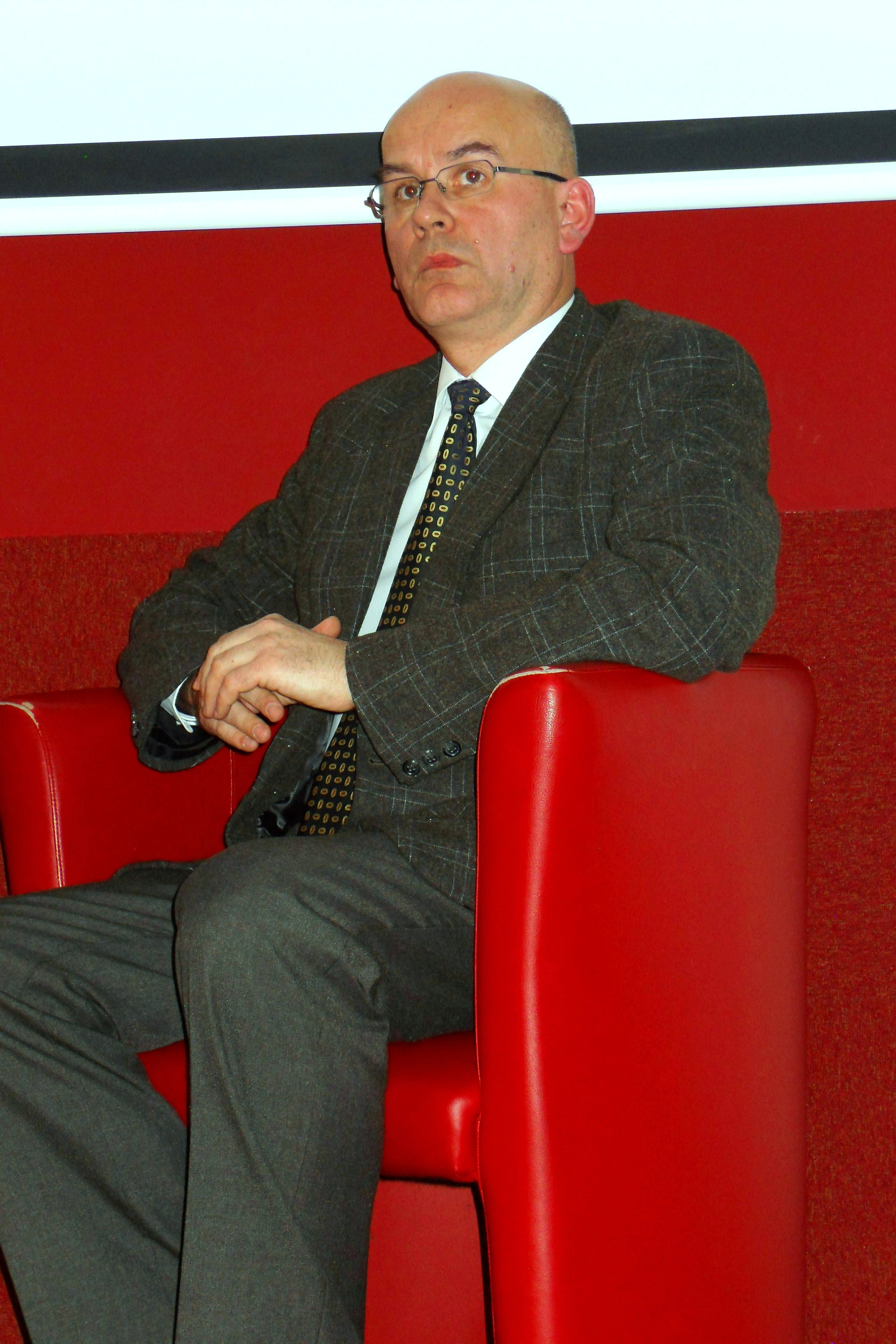 Dr Grzegorz Berendt, gdański historyk.